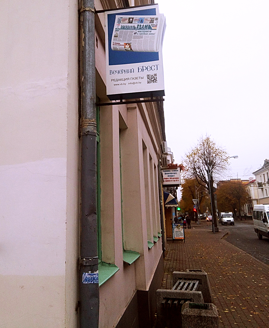 Вечерний Брест, вывеска